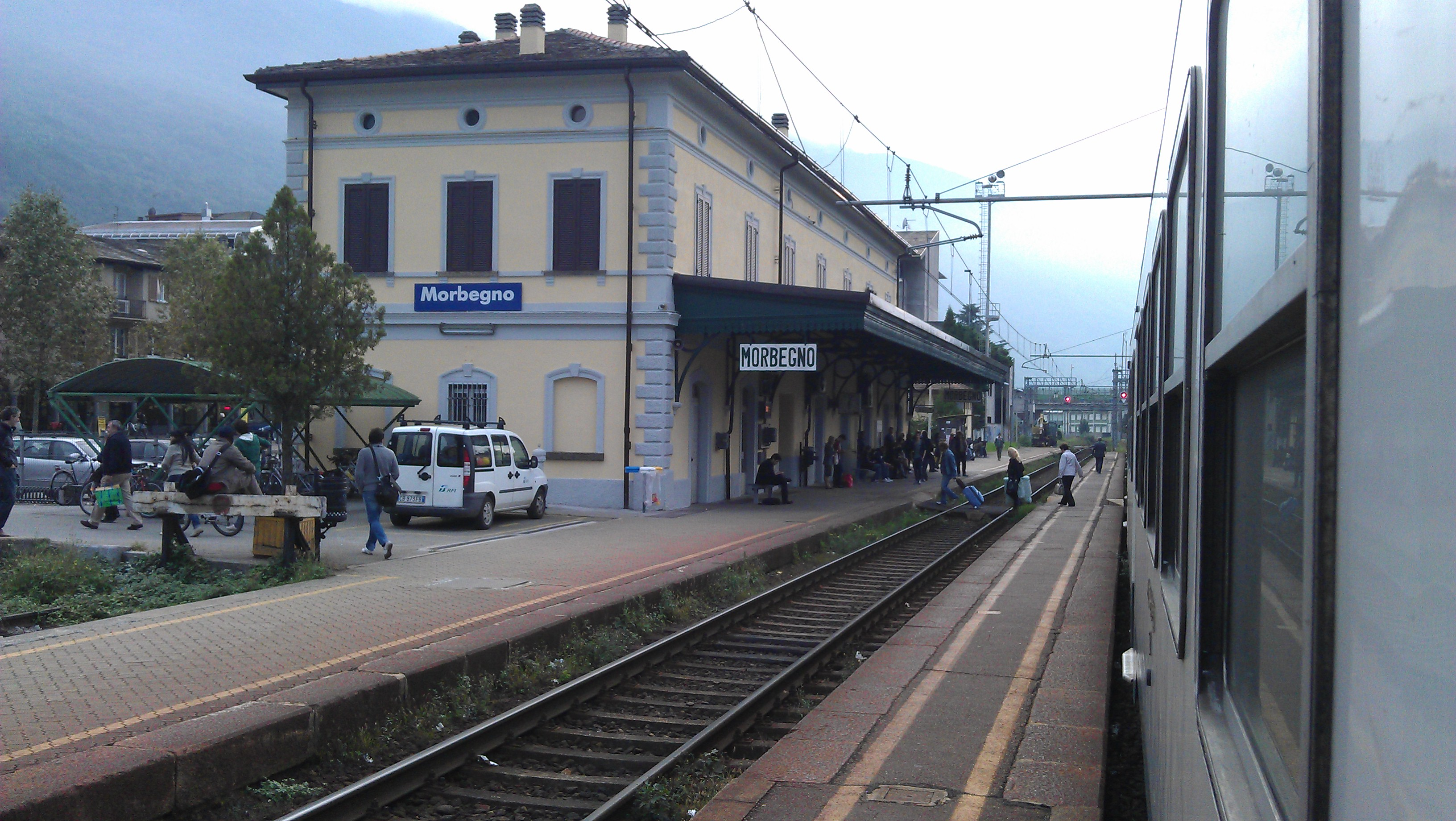 Morbegno FS dopo la recente opera di ripristino del decoro